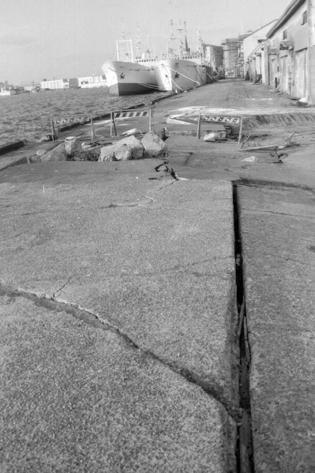 北埠頭の被害状況